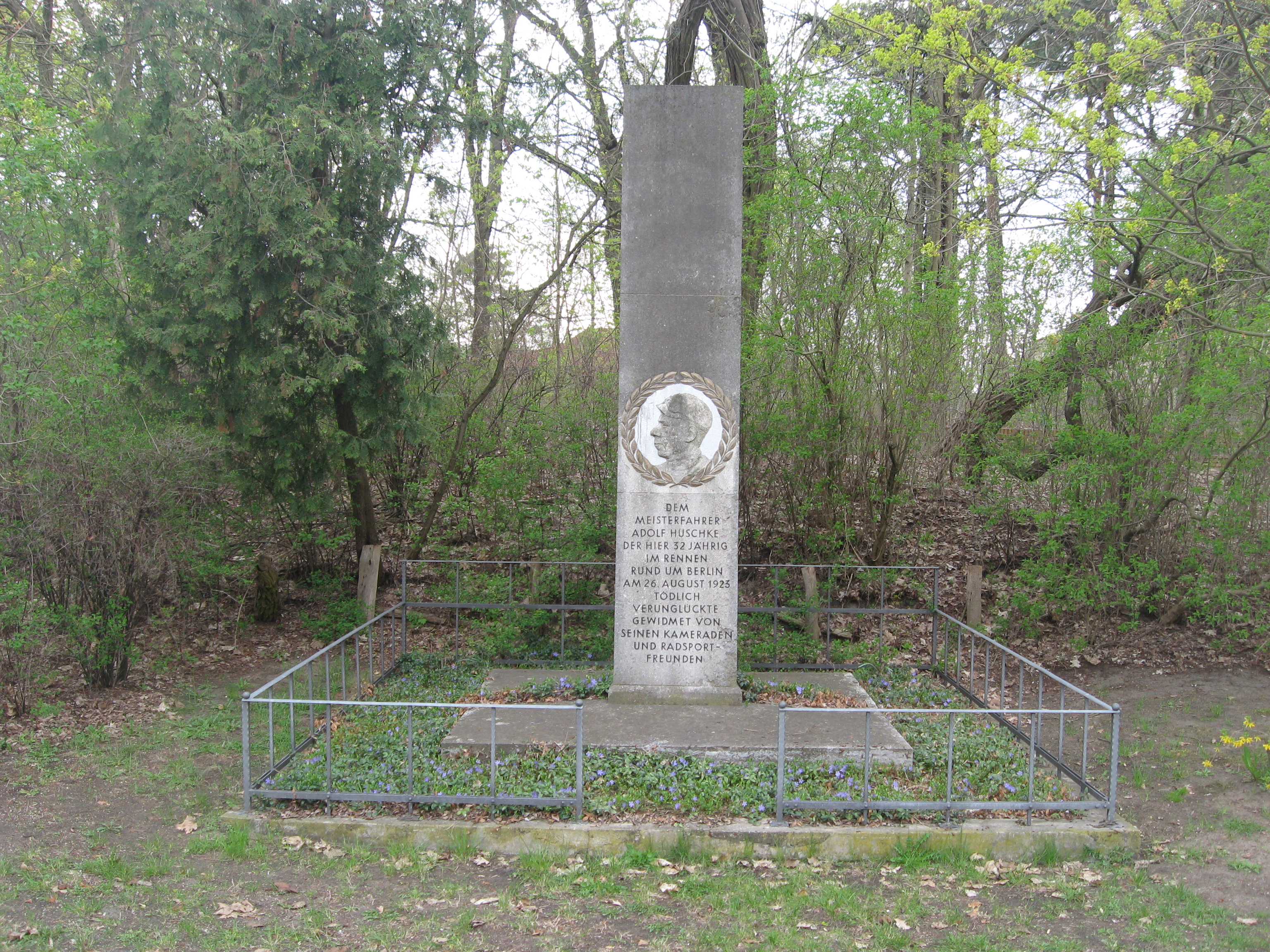 Denkmal für den an dieser Stelle tödlich verunglückten Radrennfahrer Adolf Huschke in Oranienburg-Sachsenhausen